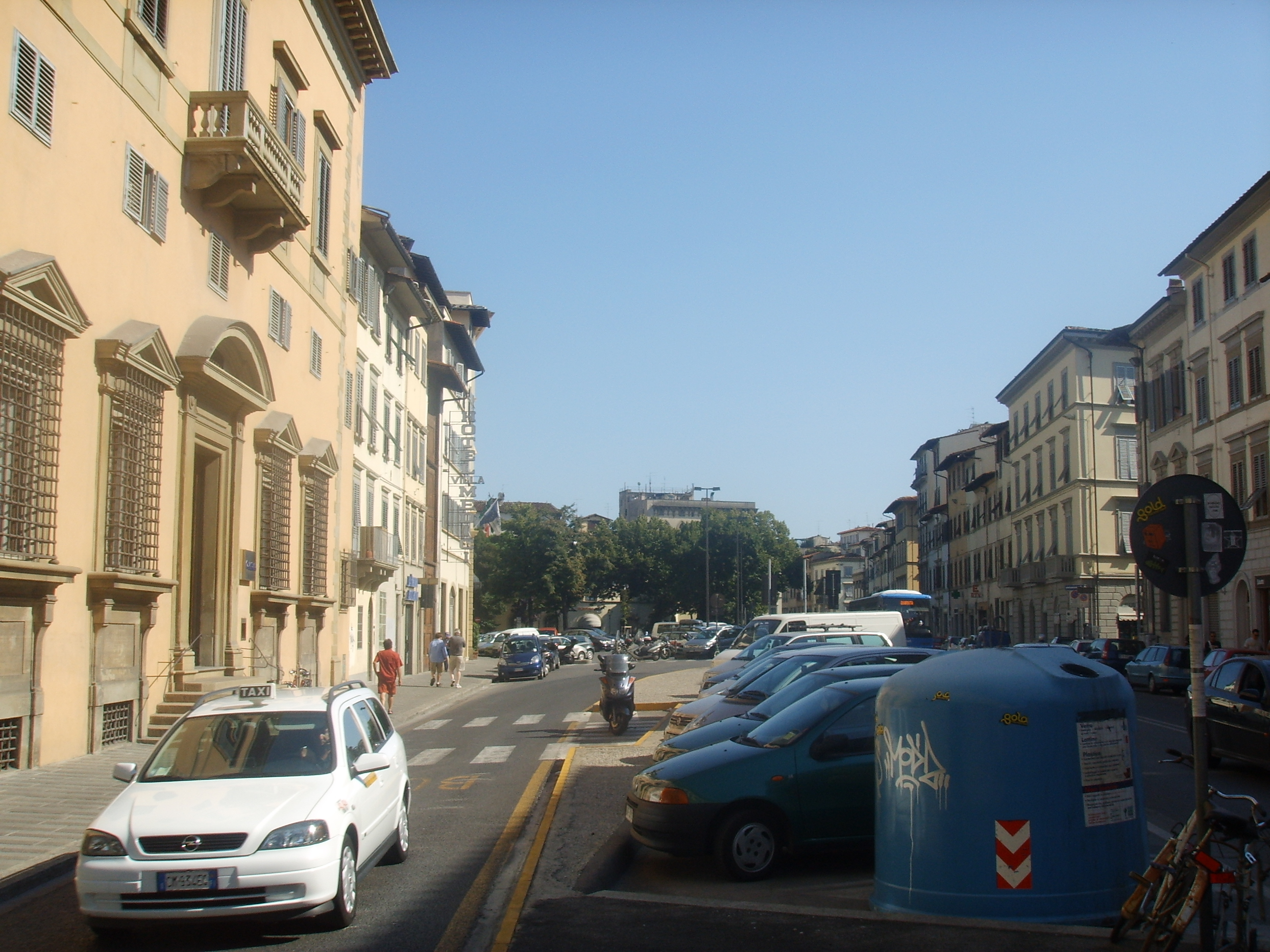 Il prato square in Florence, Italy